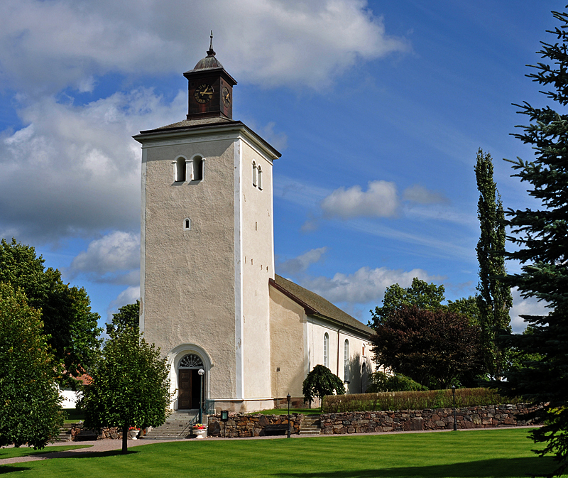 Hova kyrka i Hova i Skara stift.